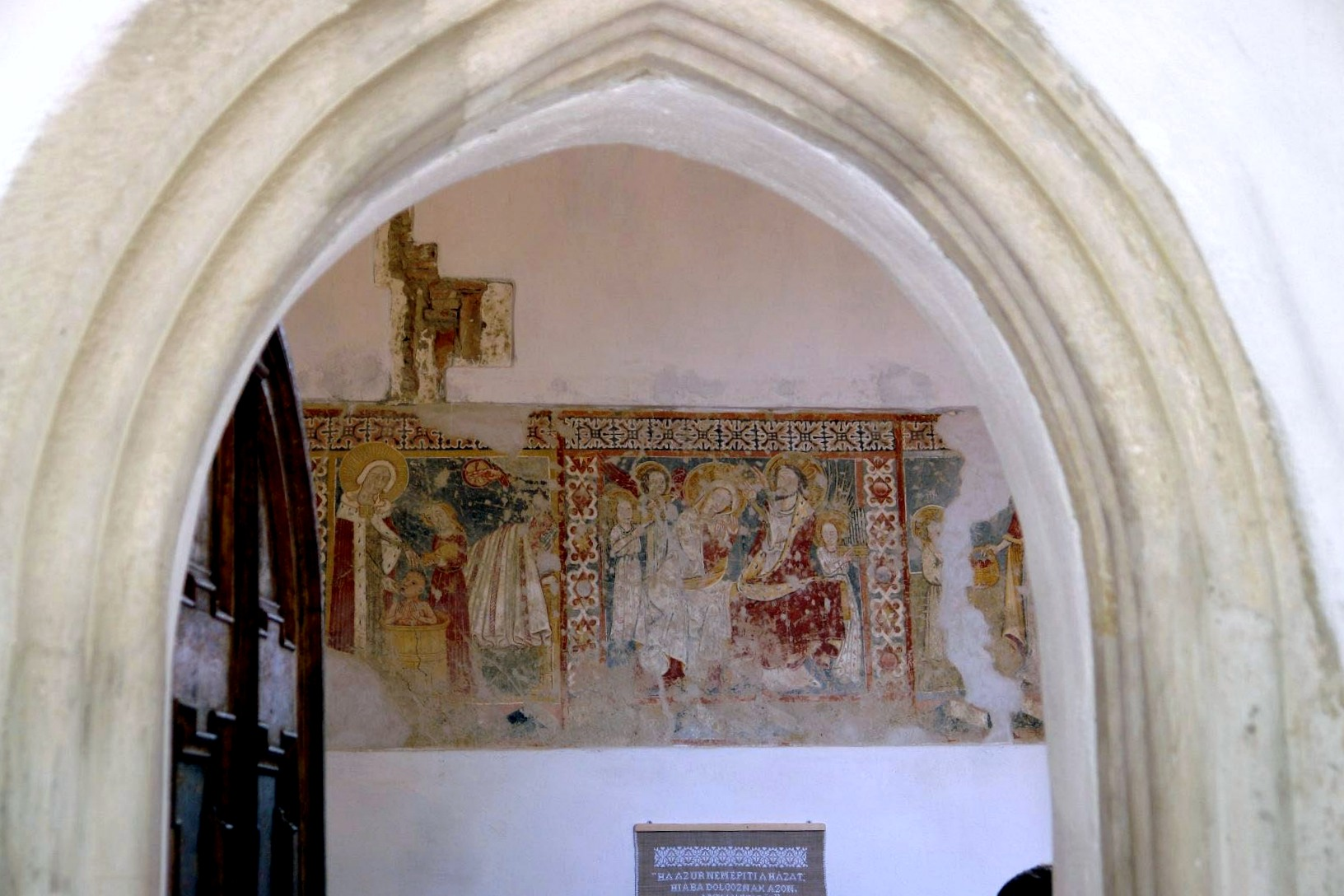 Nagygalambfalva ref. templom freskója